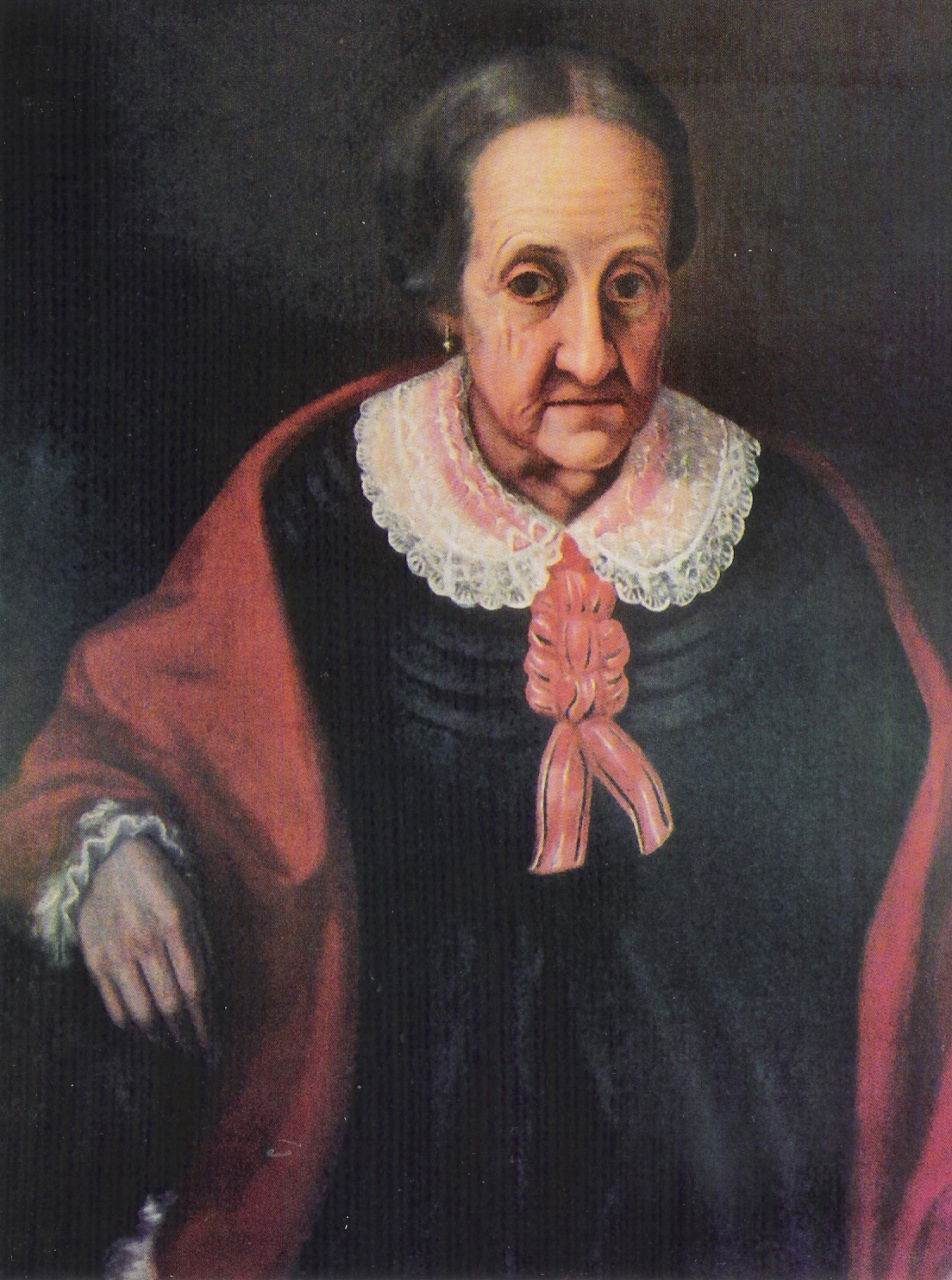 Filha de José Veríssimo da Fonseca e Ana Felizarda Joaquina de Oliveira, e esposa do aclamado Barão Romualdo José Monteiro de Barros.